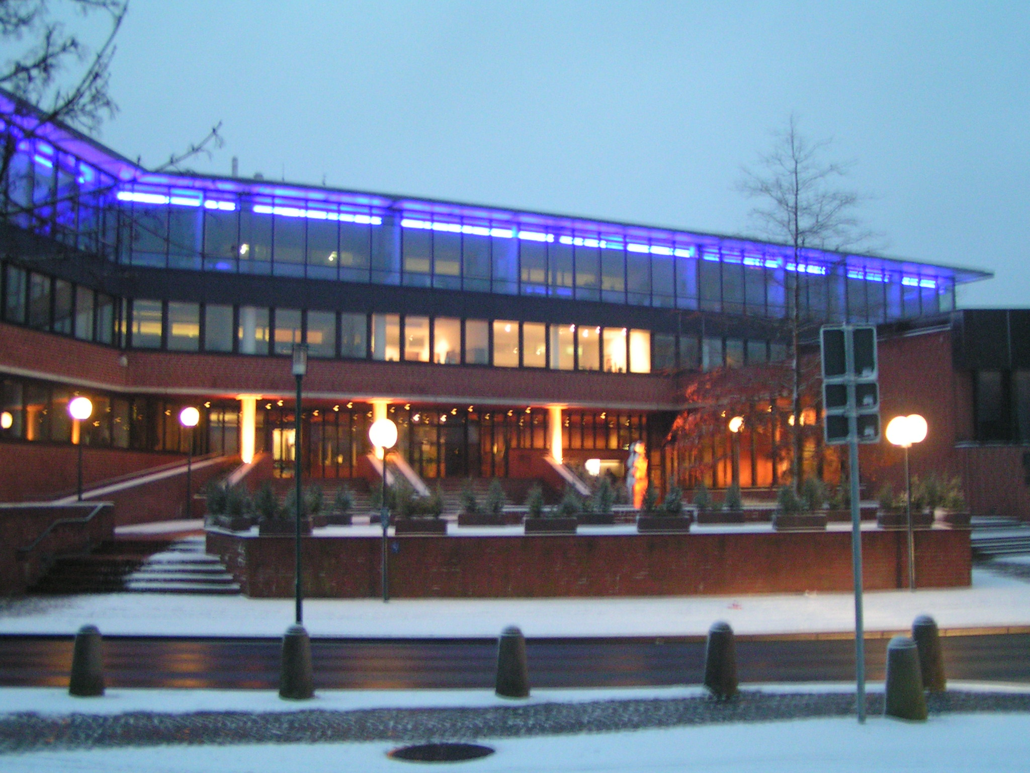 Rathaus der Stadt Lohne mit Jubiläumsbeleuchtung (100 Jahre Stadt Lohne im Jahr 2007)